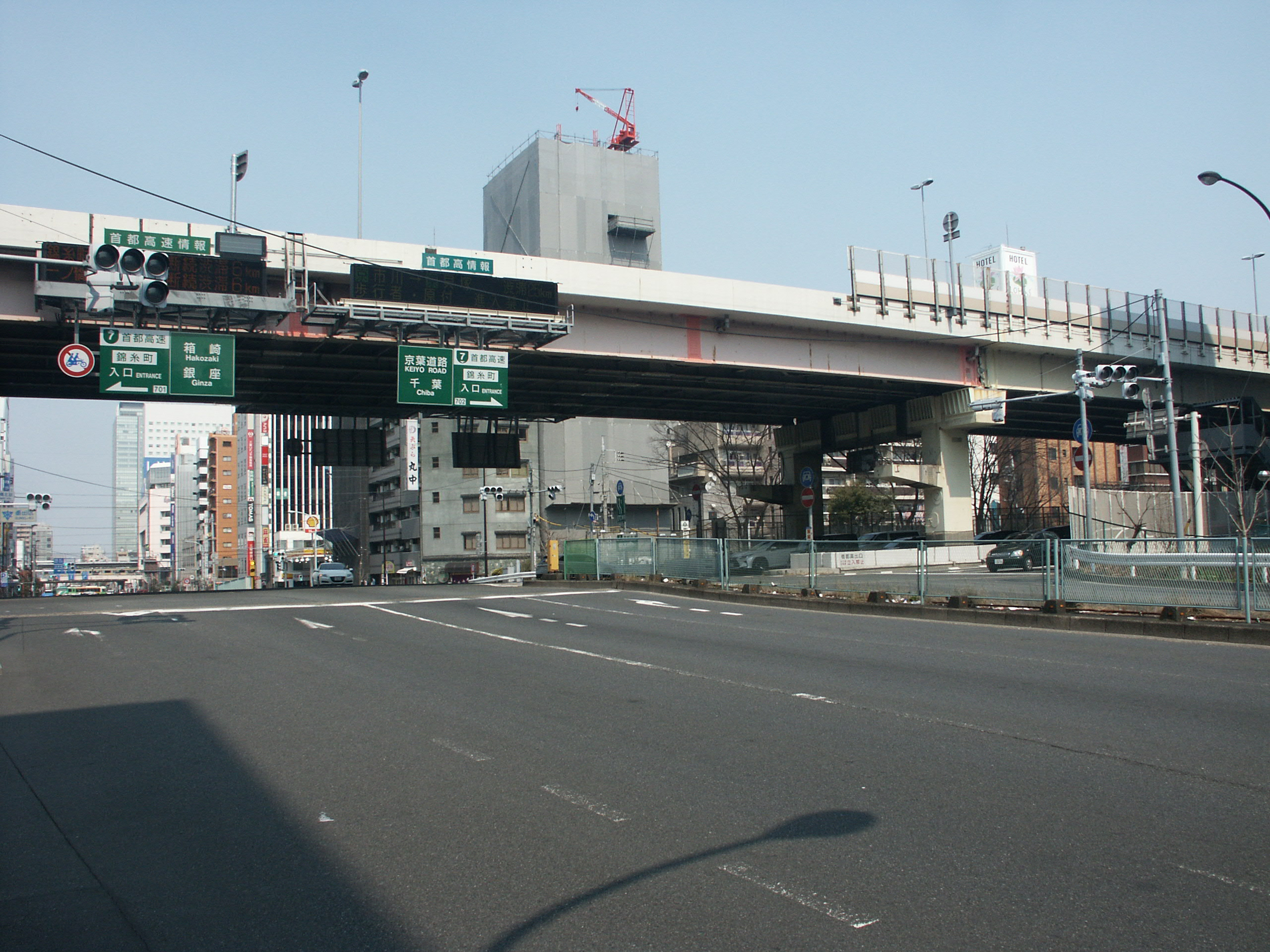 首都高速道路錦糸町出入口付近(四ツ目通り側から撮影)